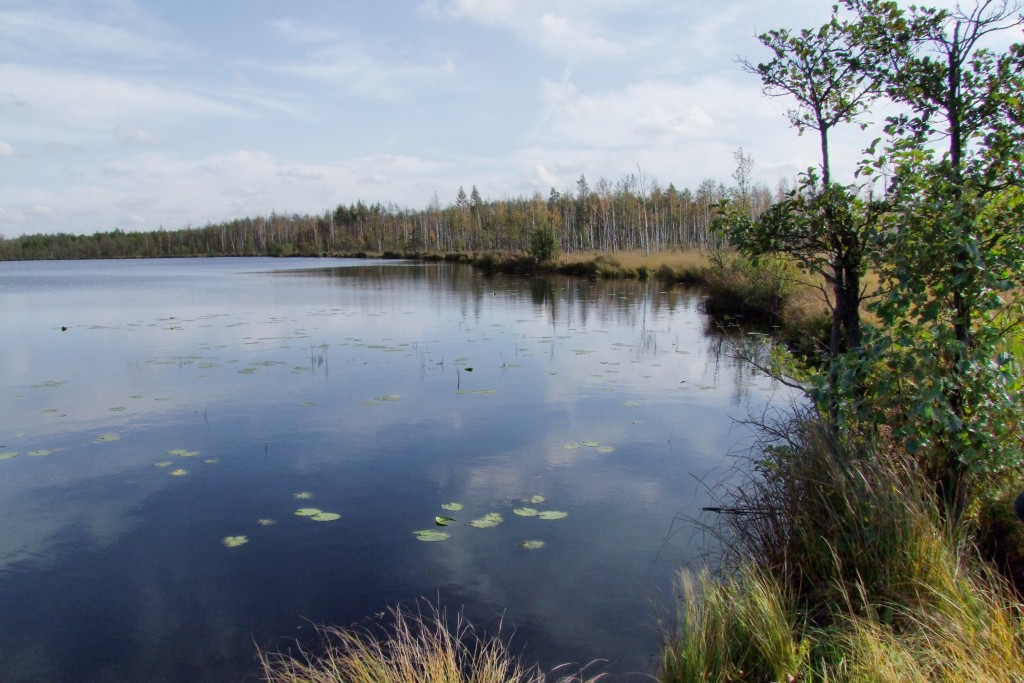 Teiču purvs - Islienas ezers